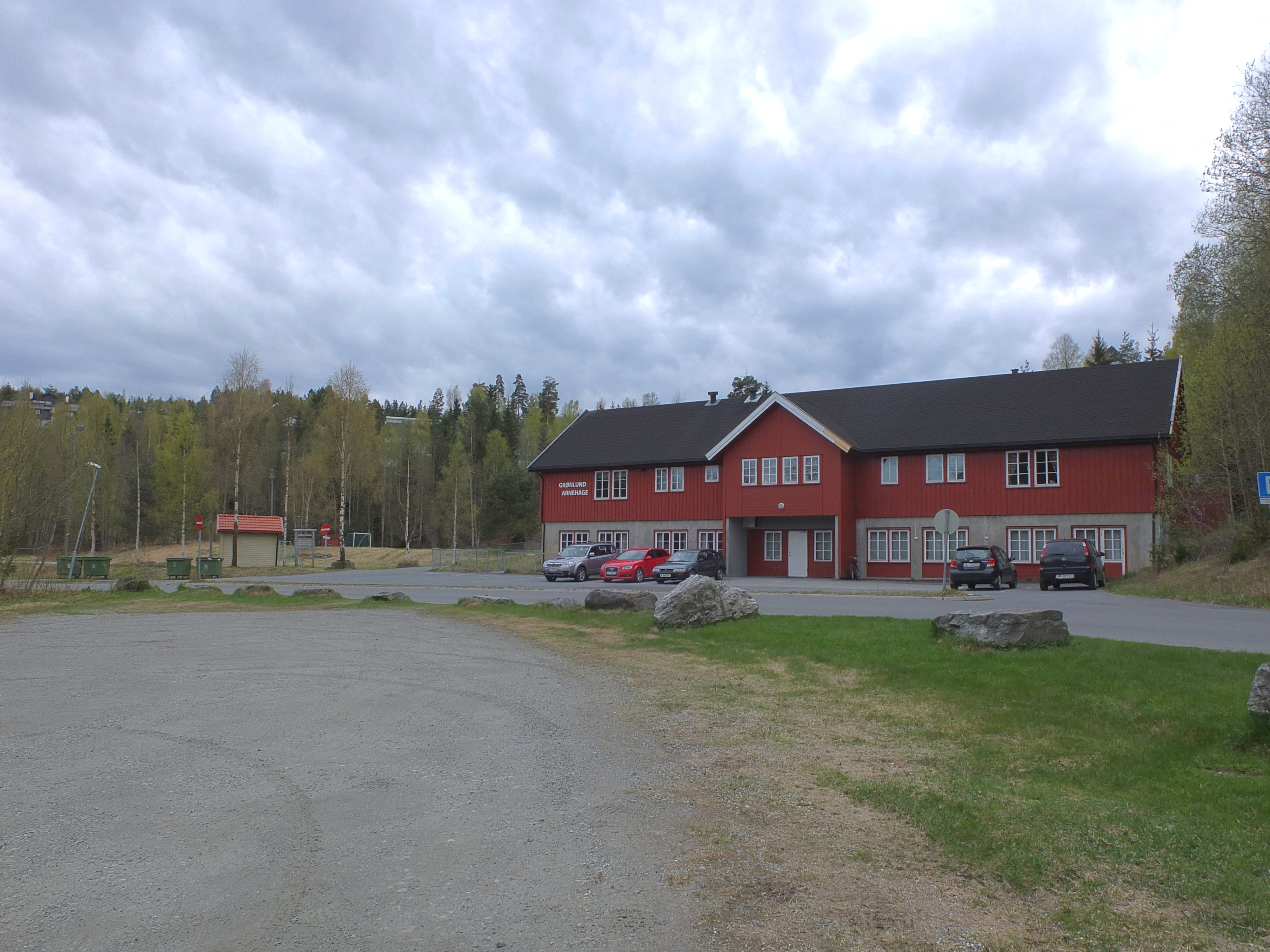 Grønlund i Gjerdrum